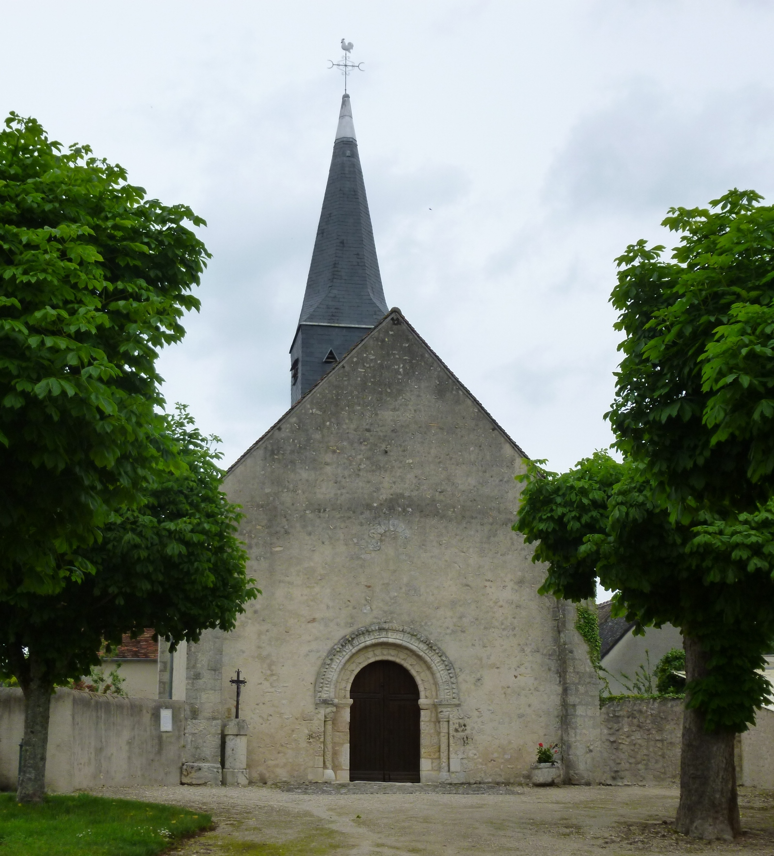 L' église